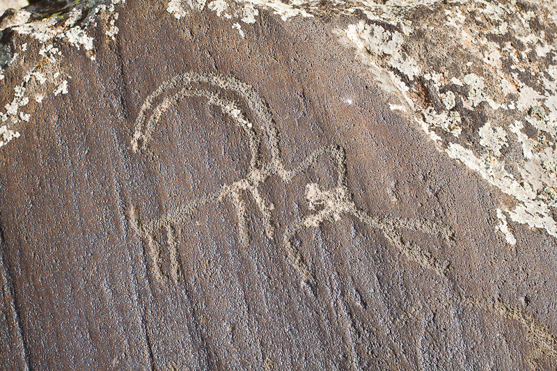 Ուղտասարի ժայռապատկերներից մեկի լուսանկար